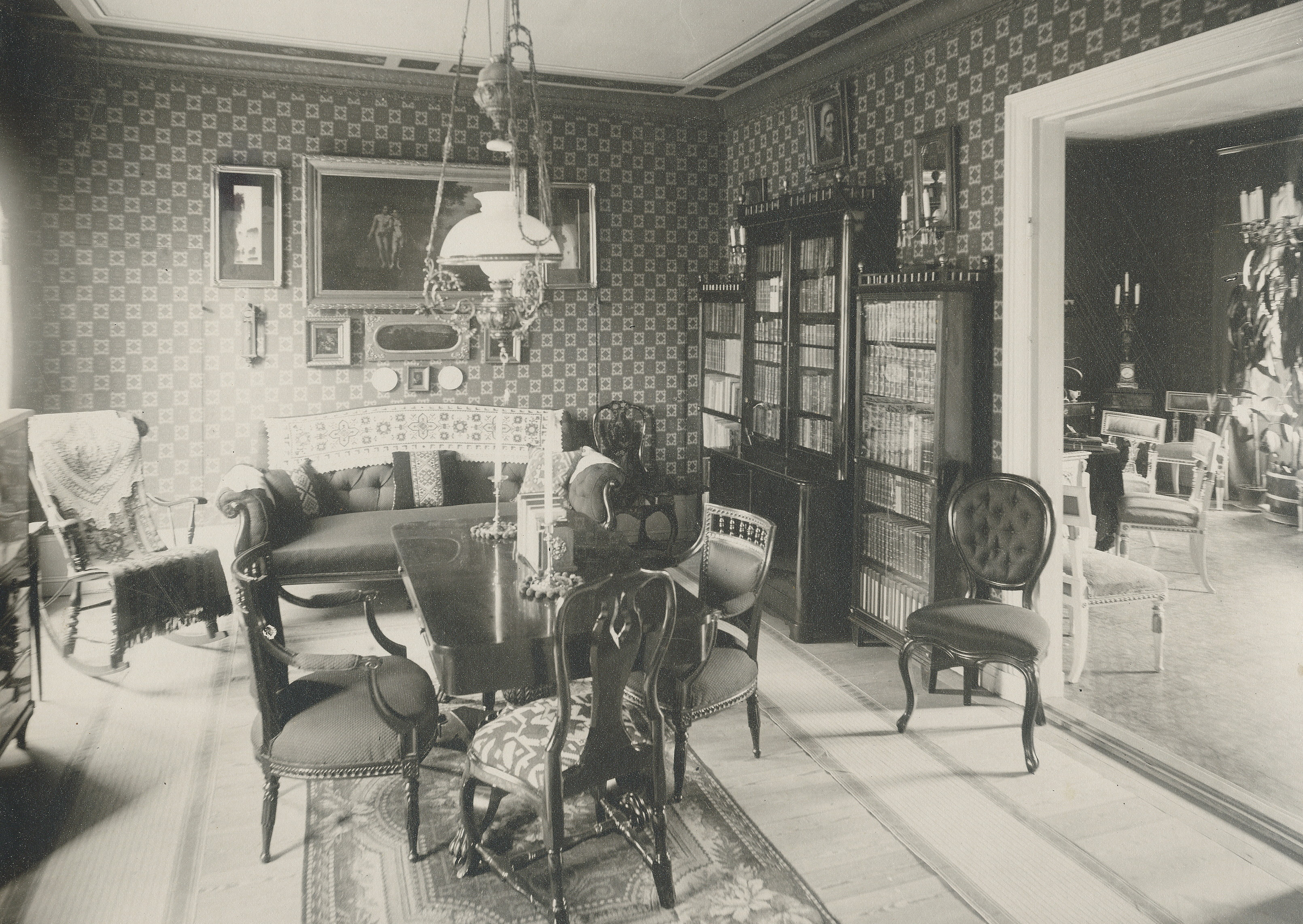 Sysslomansbostaden i Valentinhuset, Sabbatsberg